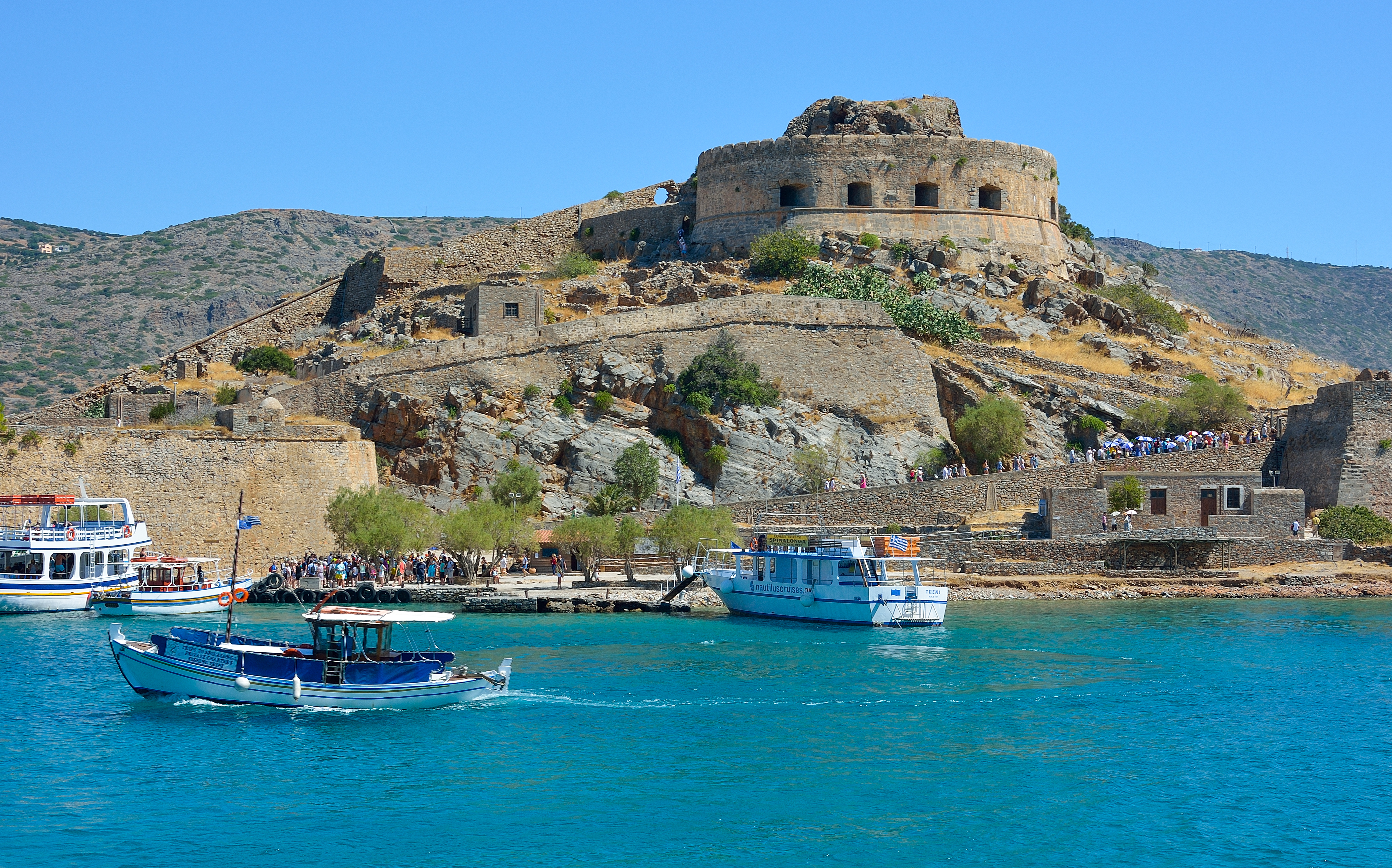 о.Спиналонга_2014